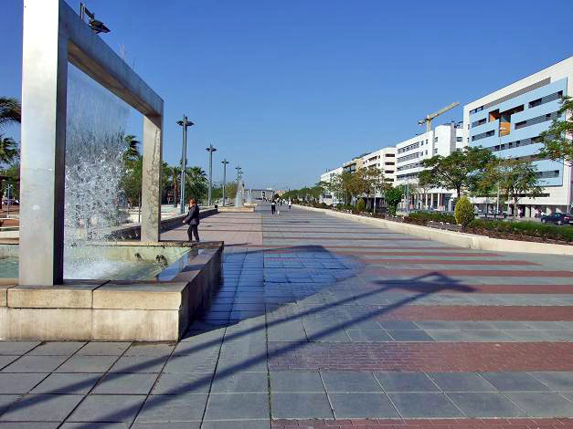 Paseo de Córdoba, en Córdoba (España).